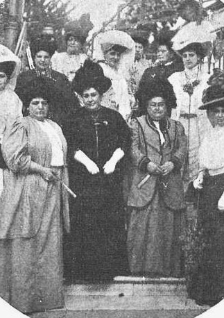 Sra. Mercedes Montero Rondeau de Canaveri (centro), Presidenta de la Sociedad Protectora de Huérfanos Militares